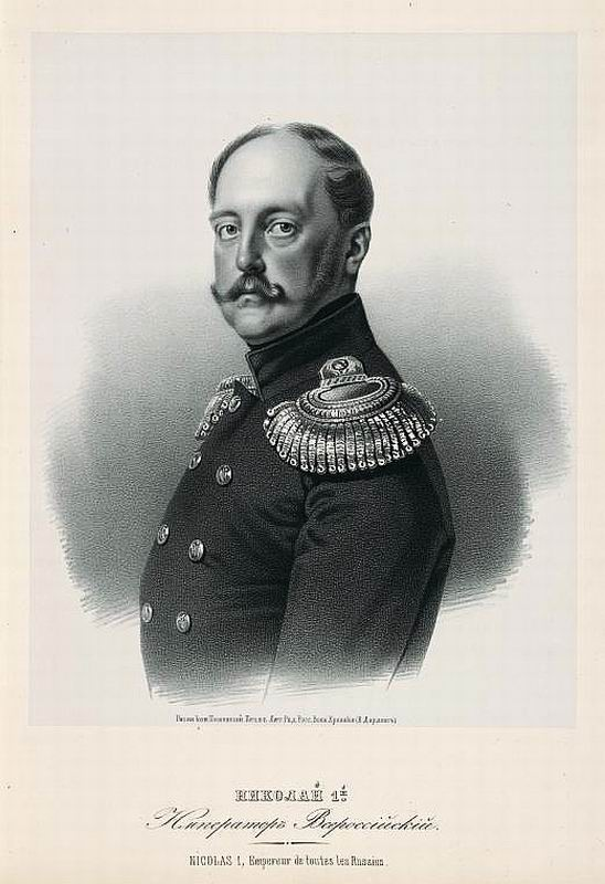 Император Николай Первый